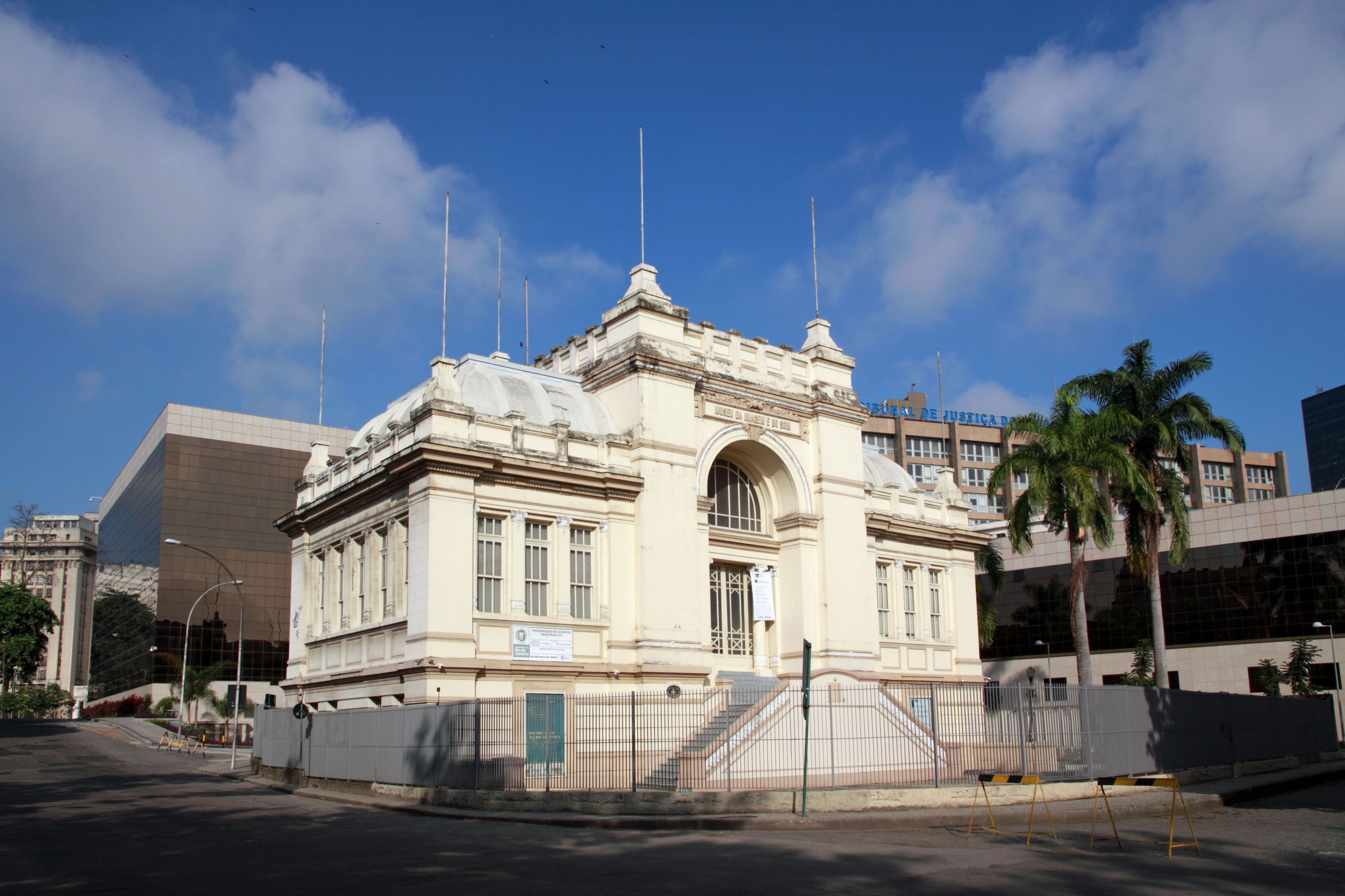 Exemplar histórico raro dos pavilhões construídos para abrigar a Exposição do Centenário da Independência do Brasil, realizada em 1922, servindo como Pavilhão da Administração e do Distrito Federal.